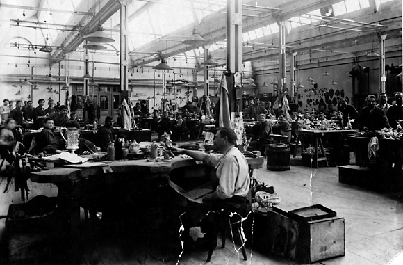 Fabrikhalle der Silberwarenfabrik Peter Bruckmann & Söhne, ca. 1900